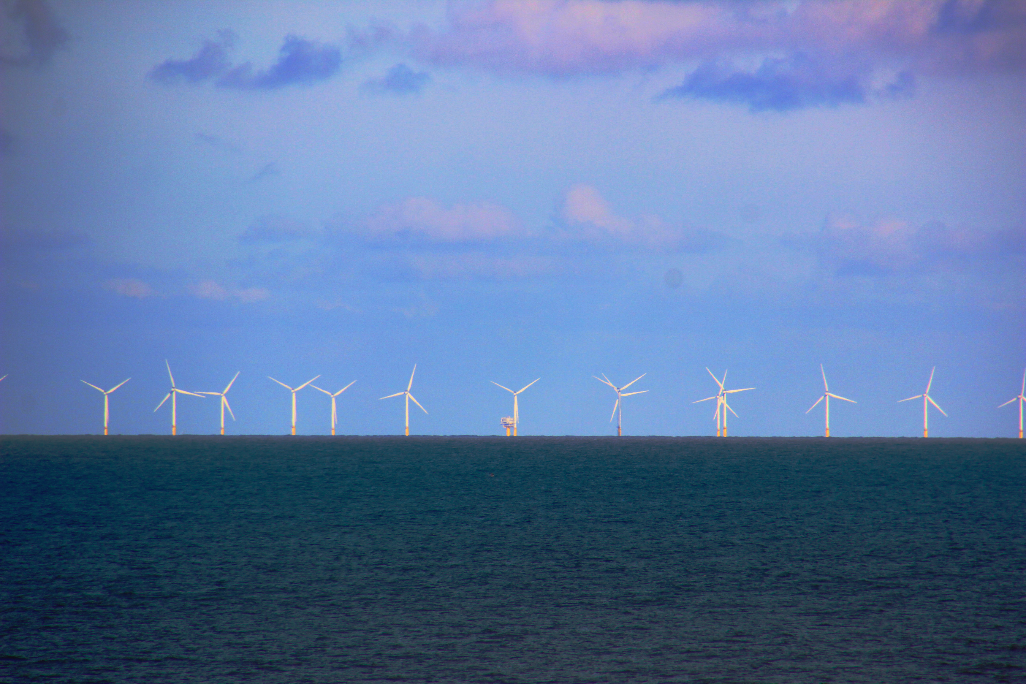 Ansicht des Offshore-Windparks „Luchterduinen“ von Zandvoort aus fotografiert. Man sieht deutlich einen Turm der Umspannplattform.